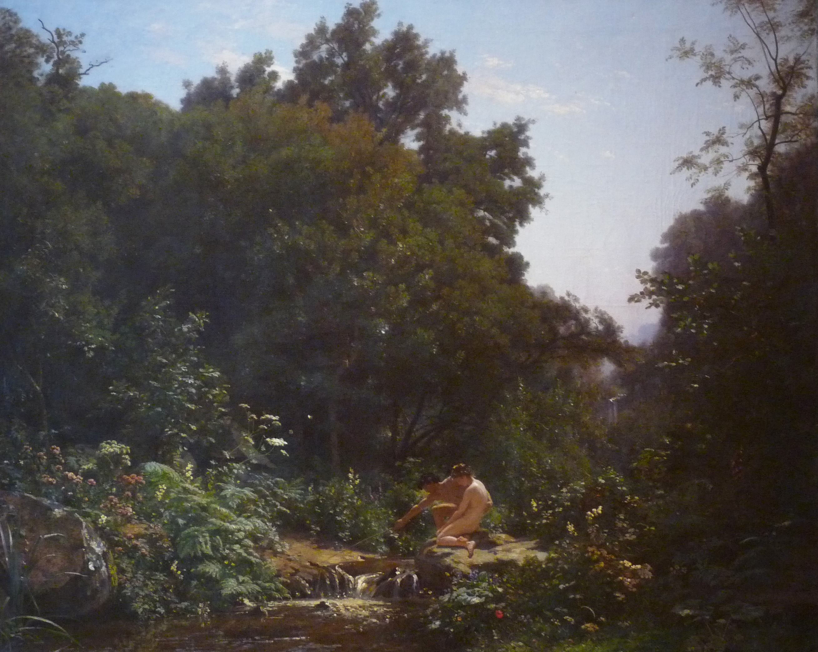 François-Louis Français, Paysage avec Daphnis et Chloé, huile sur toile, date ?, Musée d'Orsay, dépôt au Musée des beaux-arts de Strasbourg en 1919.